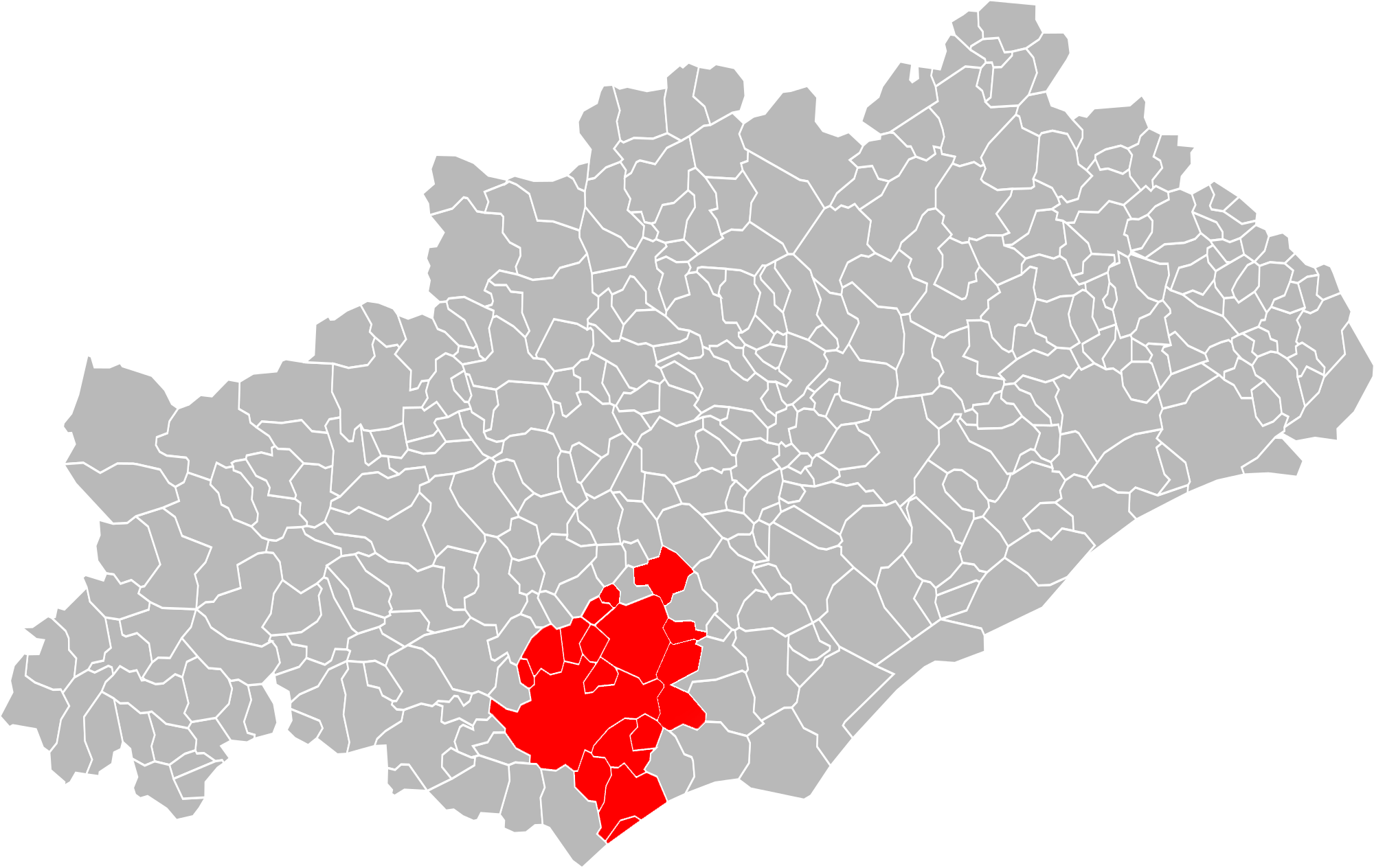 Localisation EPCI de Béziers Méditerranée dans l'Hérault, France pour 2017